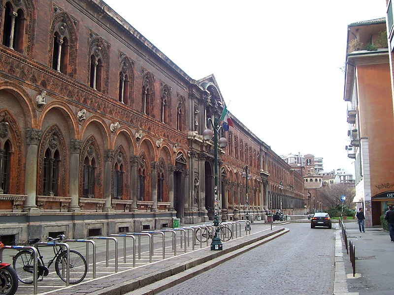 Milano - Cà Granda (Università Statale)